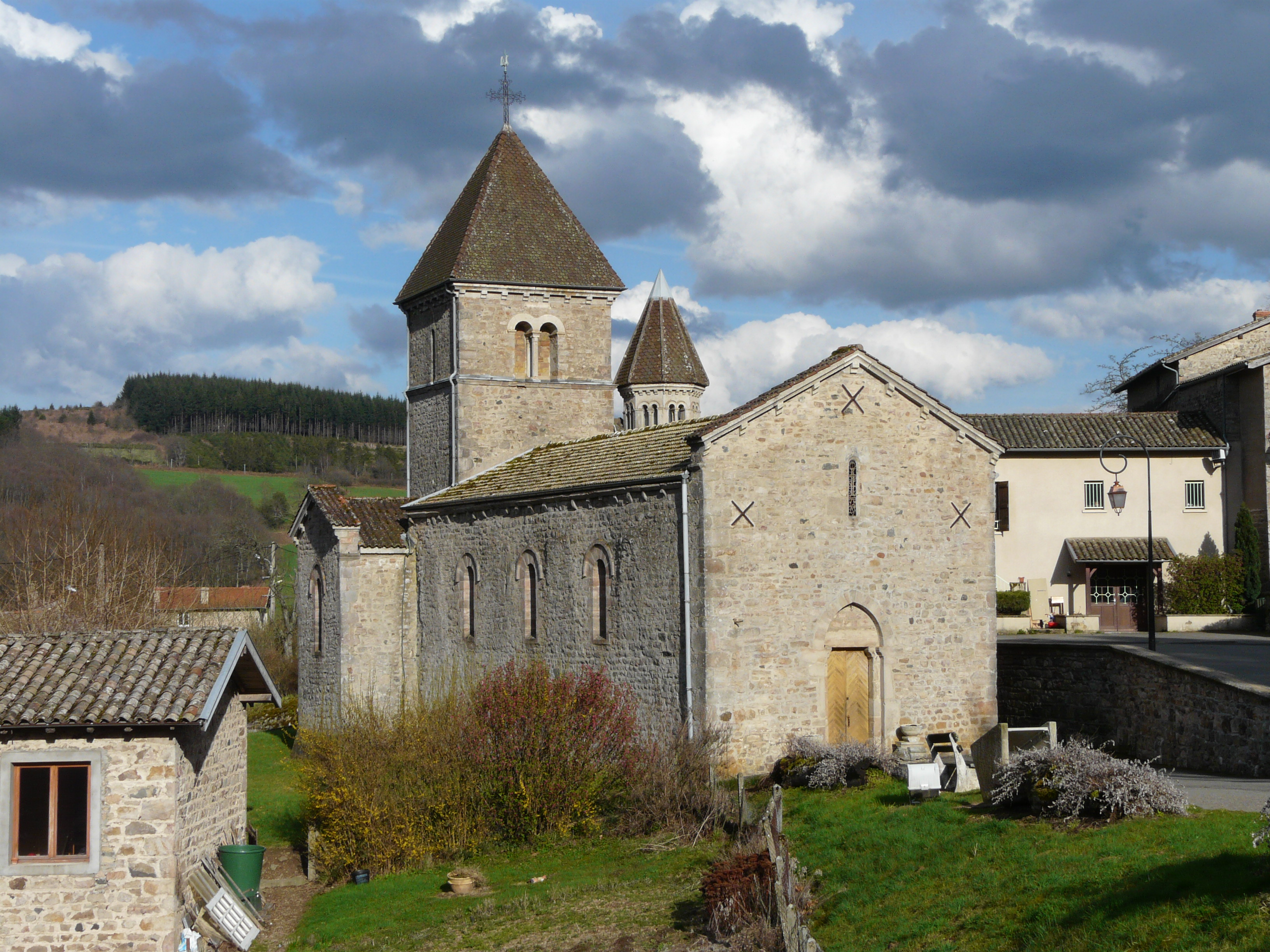 L'église d'Avenas, par le coté gauche.